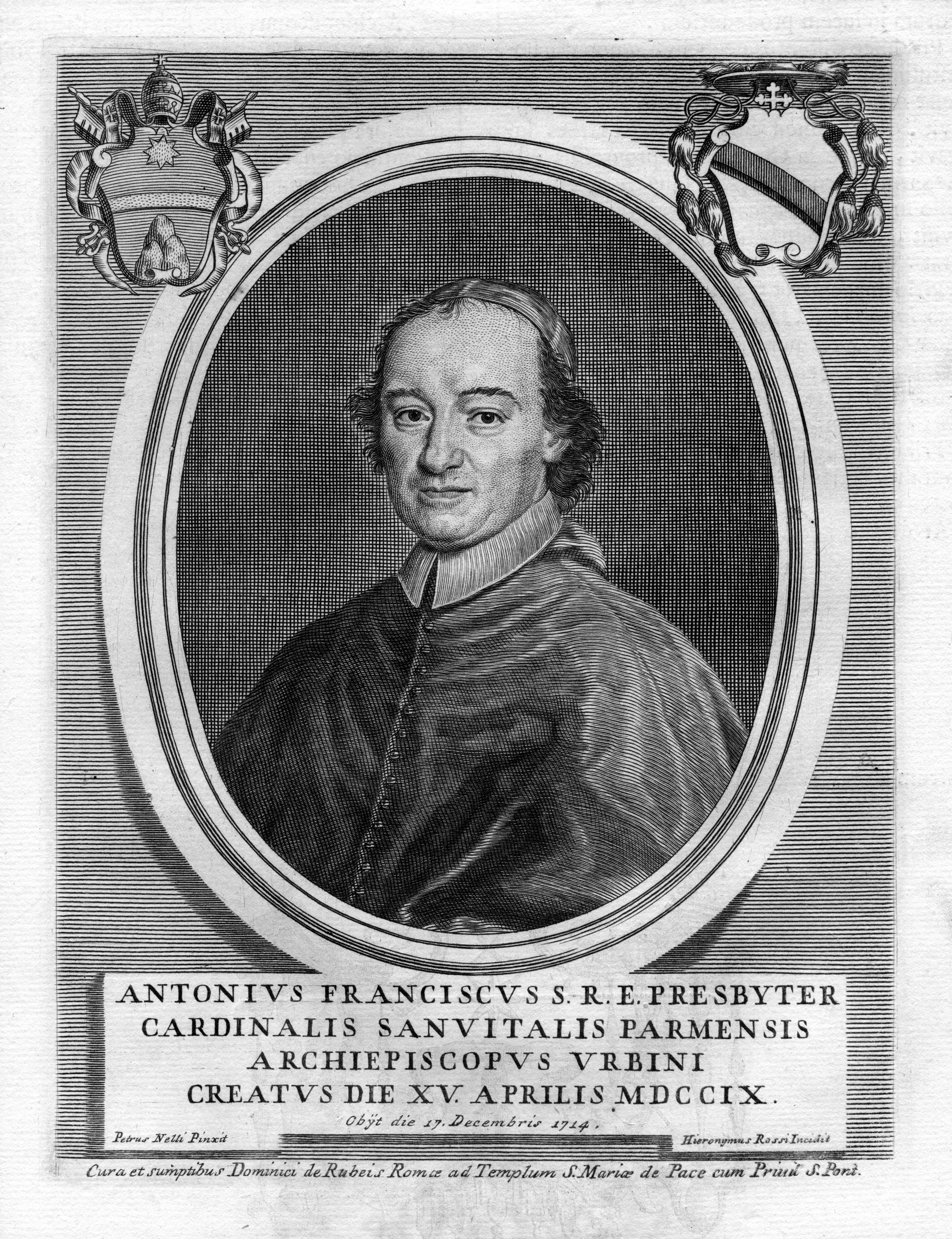 Portrait de Antonio Francesco Sanvitale (1660-1714)